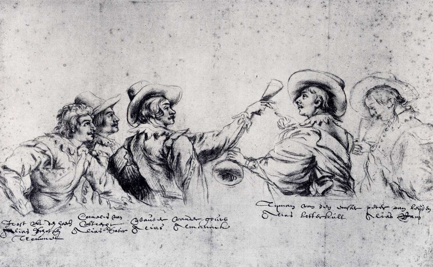 tekening van De Bentvogels of de Bentvuegels